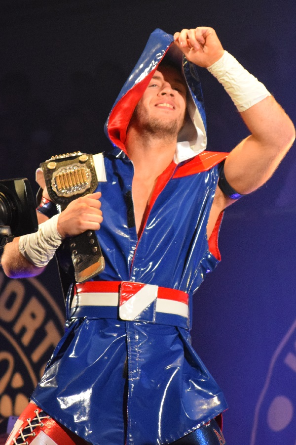 2017年11月5日 大阪府立体育会館「POWER STRUGGLE」 ウィル・オスプレイ